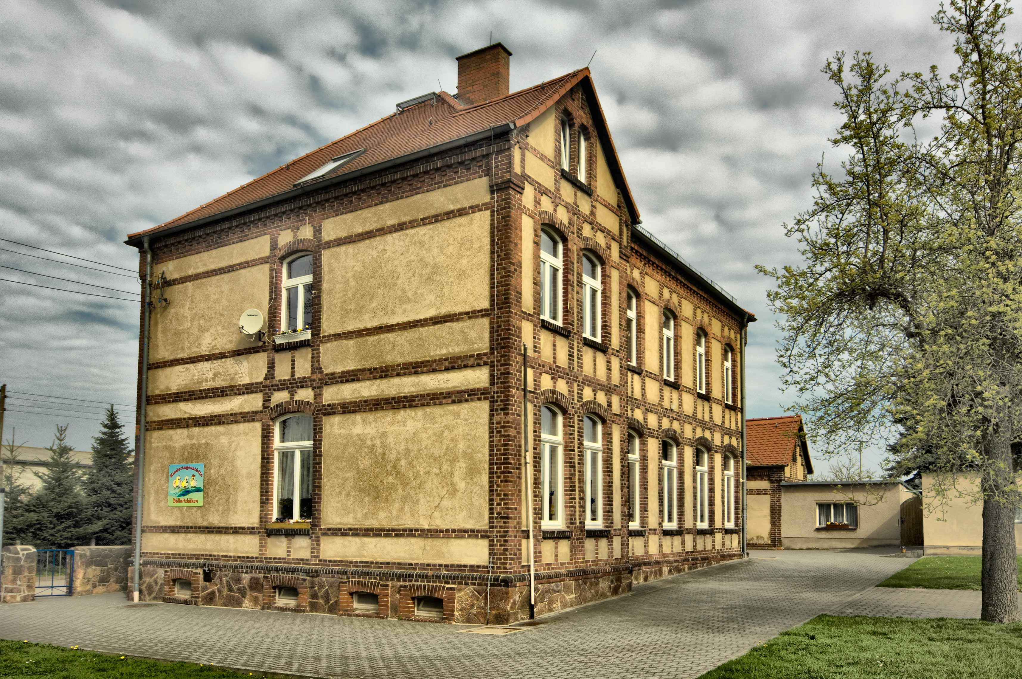 Ehemalige Schule in Liptitz, Gemeinde Wermsdorf, Sachsen